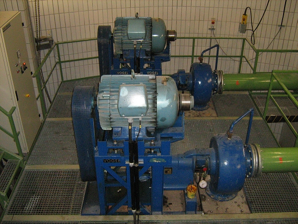 Donaudüker Linz: Kreiselpumpen 5 (vorne) und 6 für Abwasser (Ansaugrohre grün). Elektromotor oben, links Mehrfach-Keilriementrieb. Hersteller: Vogel.